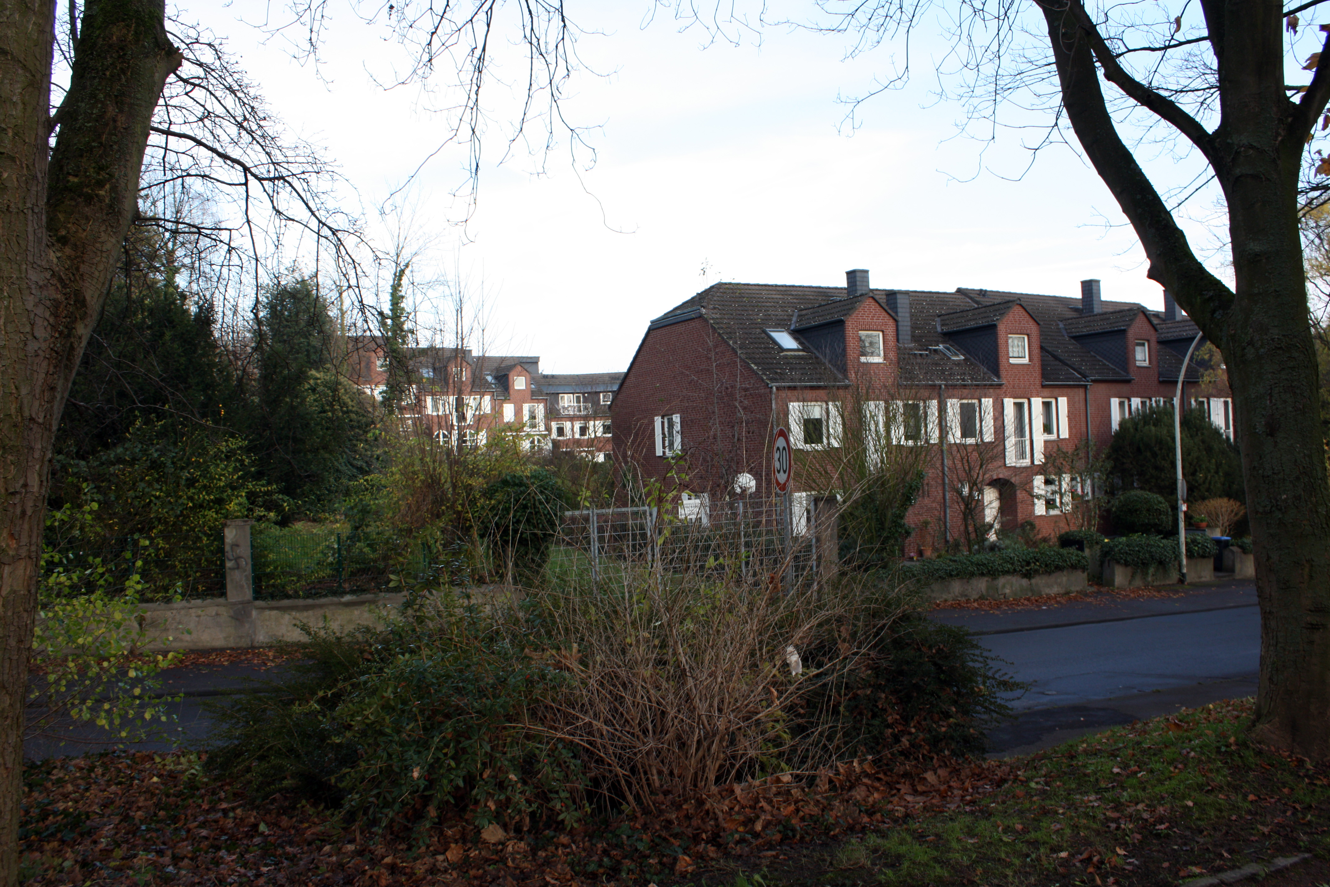 Hürth-Fischenich, heutige Bebauung des Burggeländes